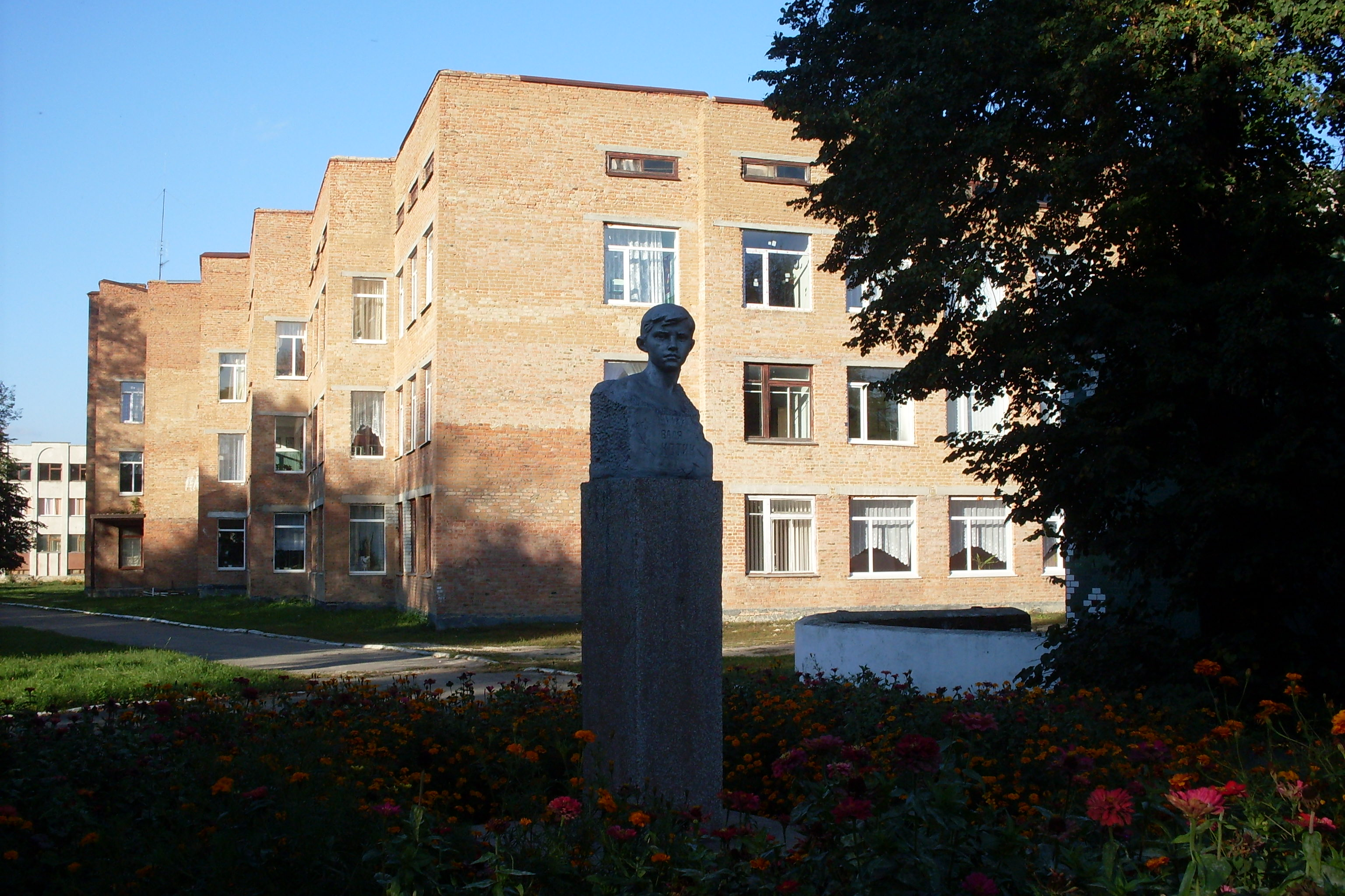 памятник вале котику в красилове